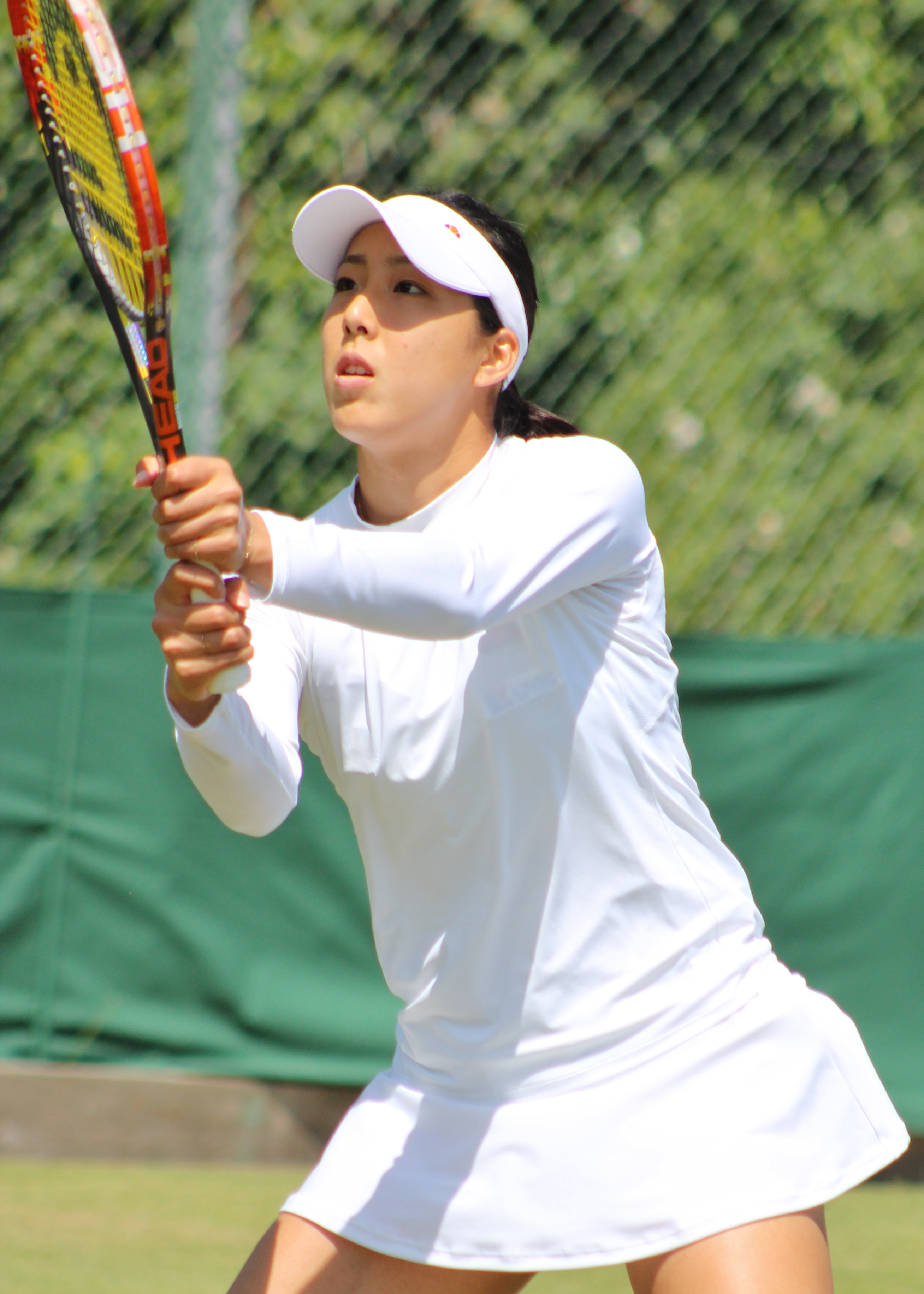 Eguchi WMQ14